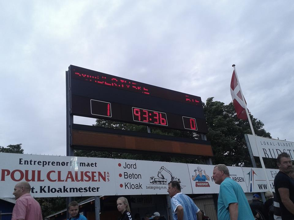 SønderjyskE sejr over Brøndby, på Haderslev Fodboldstadion, søndag d. 28 juli 2013.